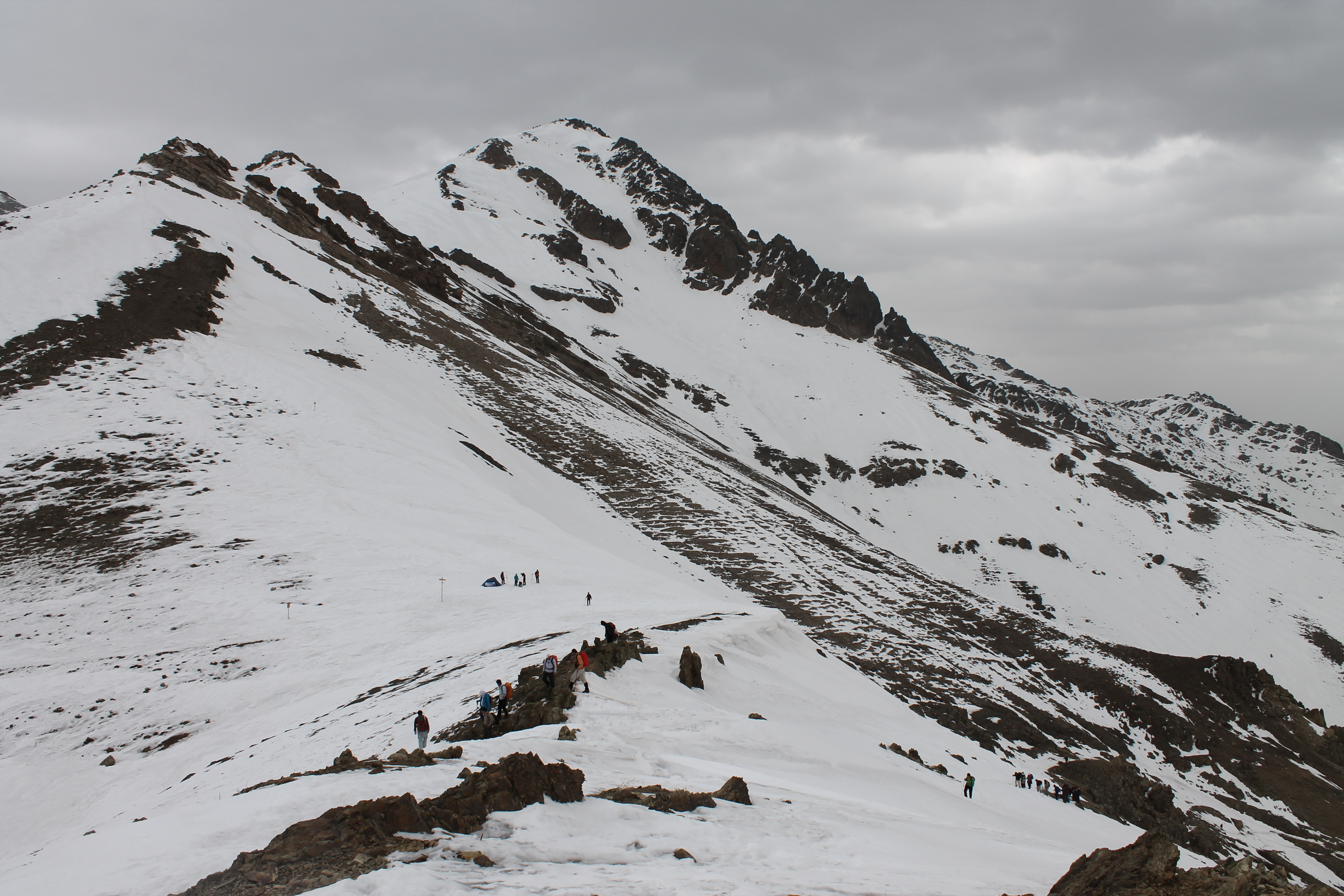 نمای قله کلکچال از روی یال قله . 11 اسفند 1391